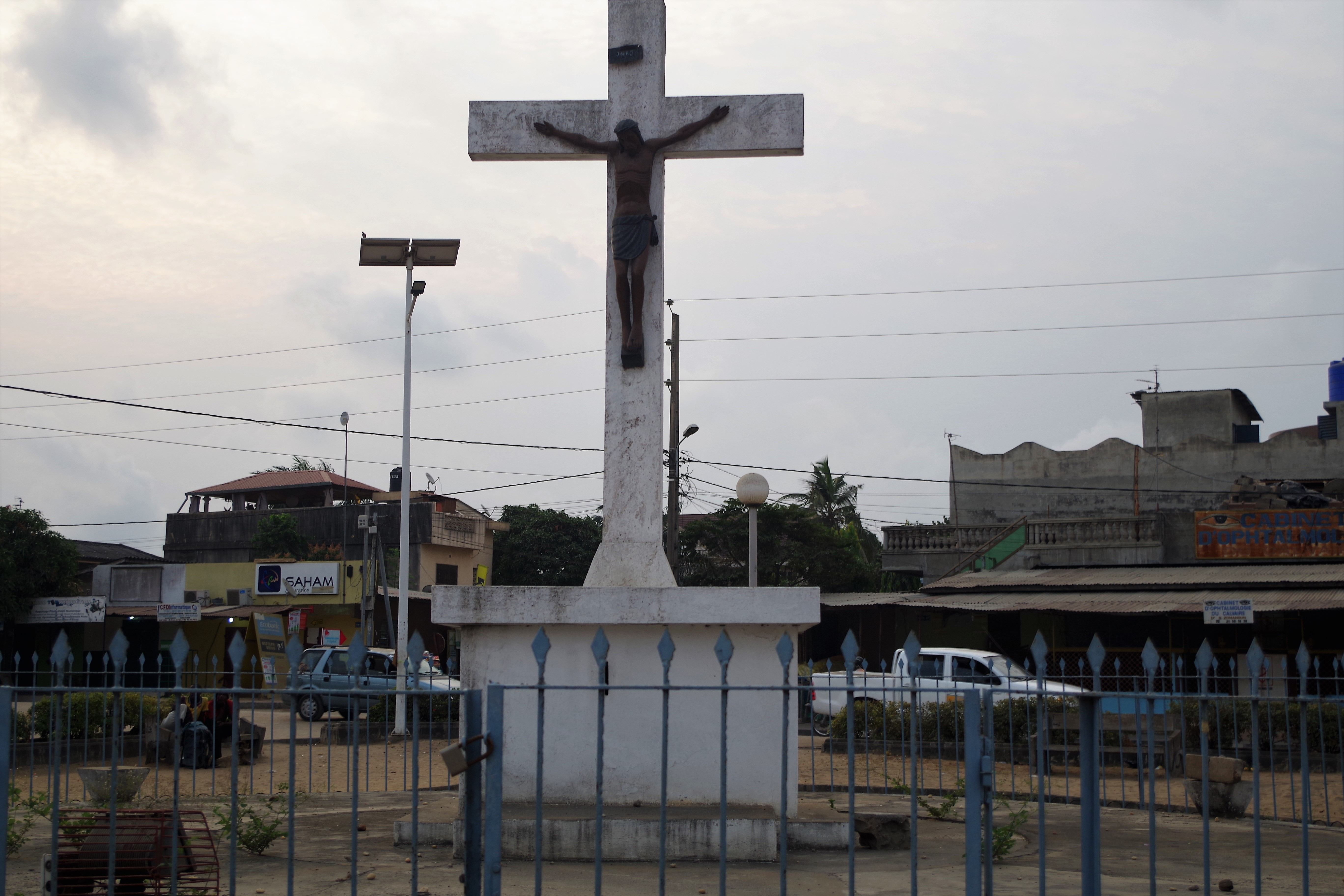 Fidjrossè est un des quartiers de Cotonou dont sa mitoyenneté avec l'océan pacifique fait de lui, un quartier beaucoup convoité et animé.